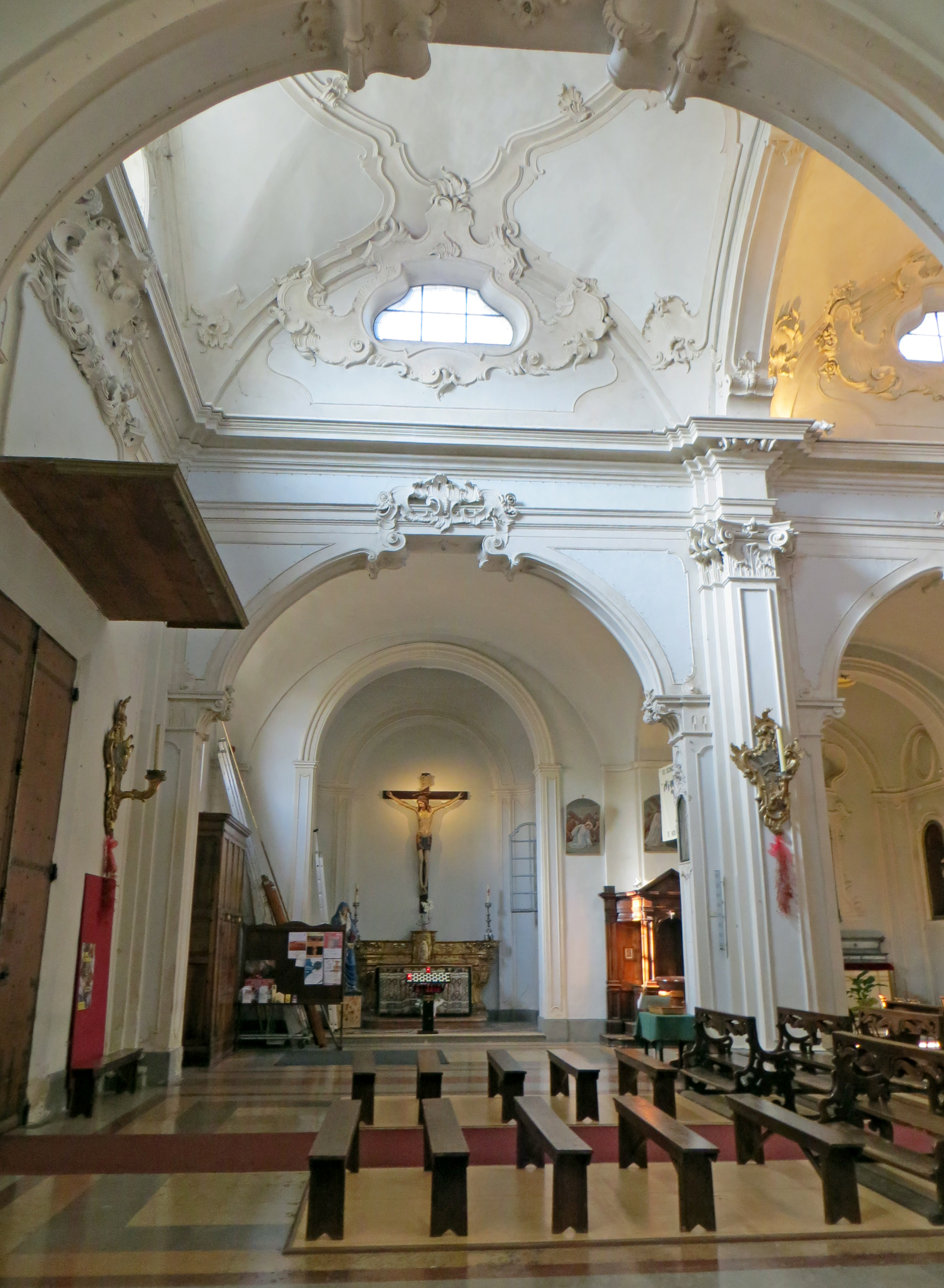 Collegiata di San Bartolomeo Apostolo (Busseto) - prima campata